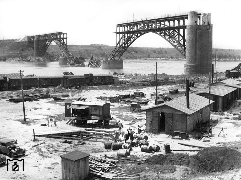 Разрушенный мост Стрелецкого через р. Новый Днепр на остров Хортица (Запорожье)